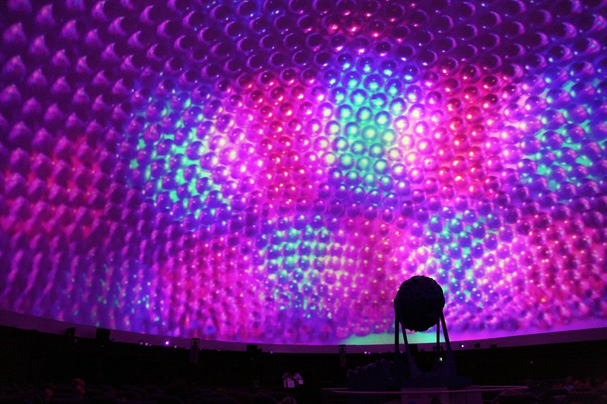 Aufnahme aus dem Zeiss-Planetarium Jena